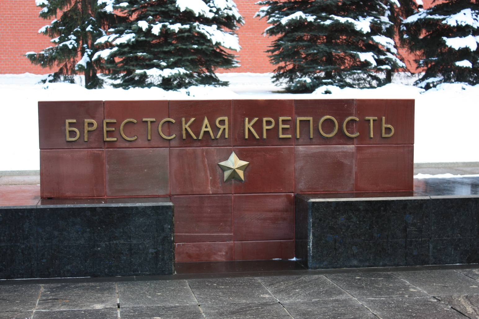 Изображение порфирового блока с землей Брестской крепости.